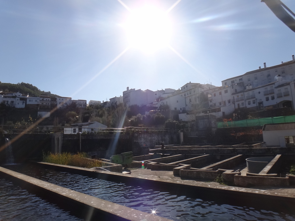 Piscifactoría de El Bosque, provincia de Cádiz (Andalucía, España)